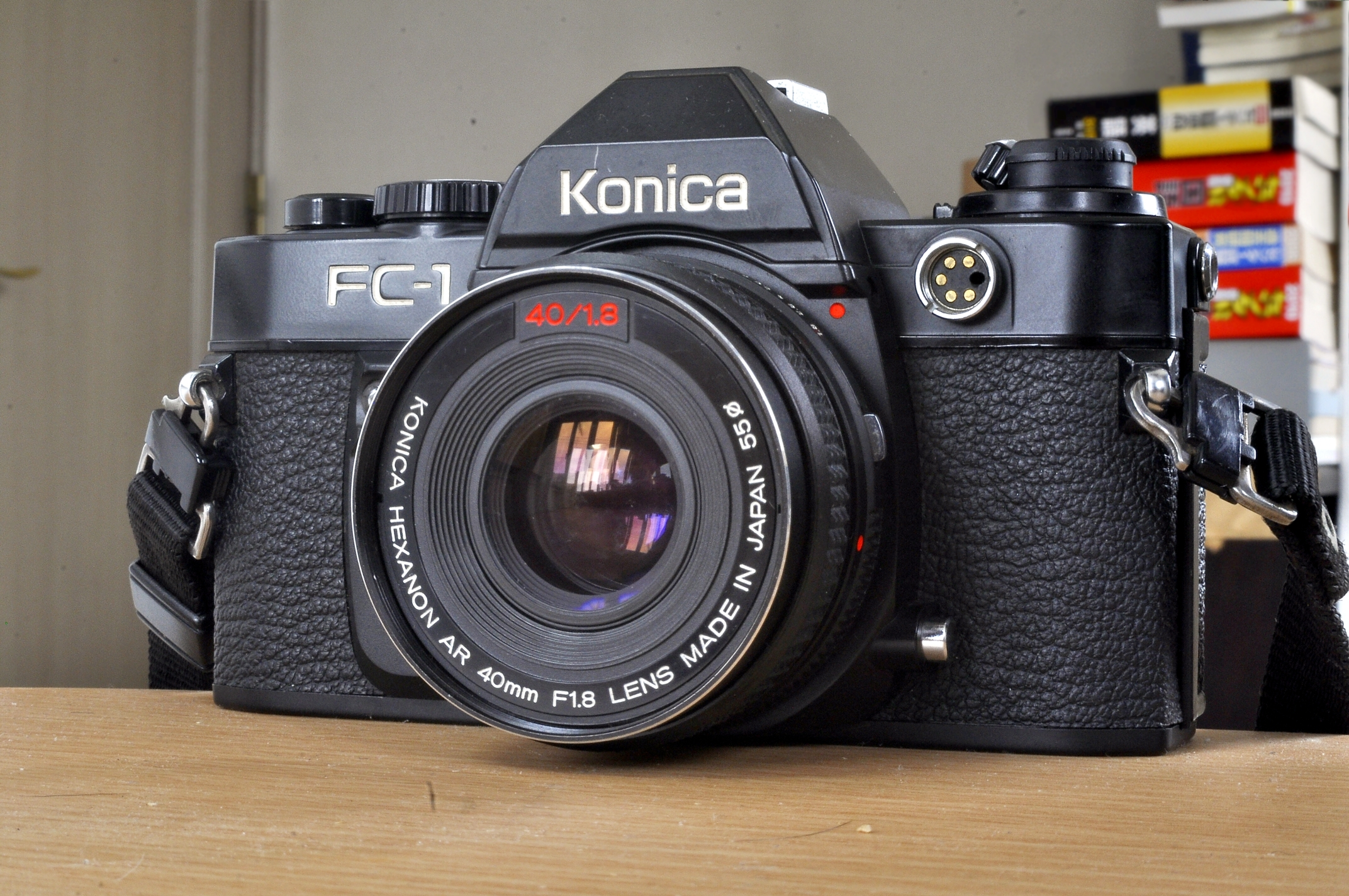 カメラ本体：FC-1 レンズ：HEXANON AR 40mm F1.8